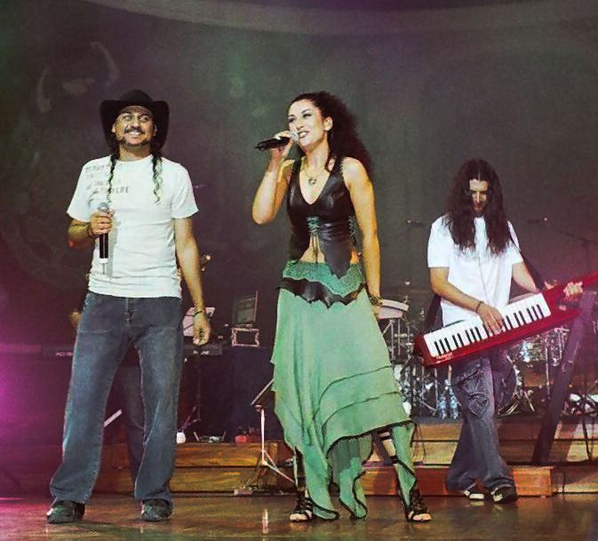 camela en concierto palu de barcelona